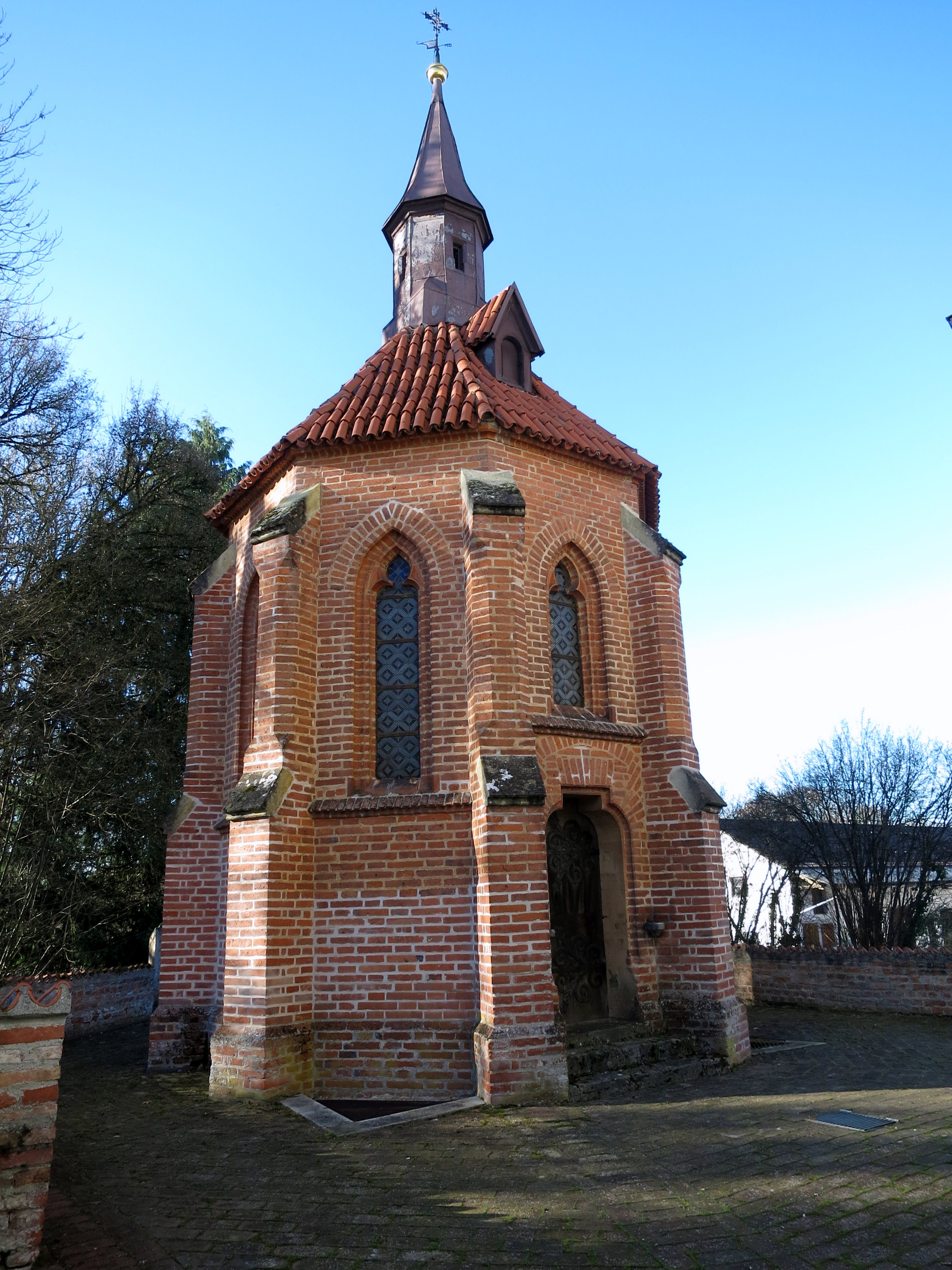 In der Nähe des Friedhofs und des Schlosses